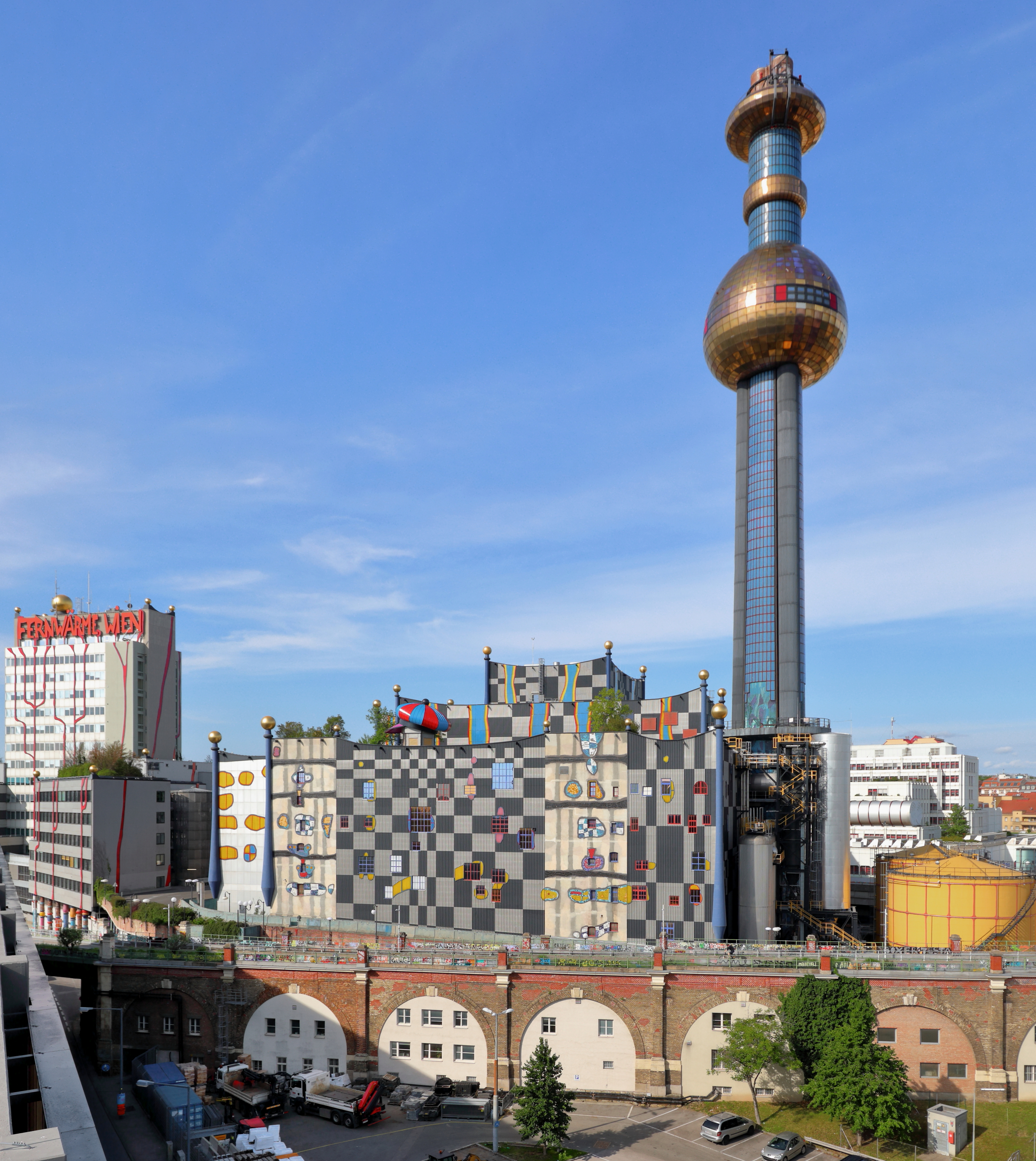 Nordostansicht der Müllverbrennungsanlage in der Spittelau, ein Ortsteil im 9. Wiener Gemeindebezirk Alsergrund und im Vordergrund die Hochtrasse (Viaduktbögen) der ehemaligen Eisenbahnstrecke "Verbindungsbogen" (Abzweigstelle Nußdorfer Straße – Friedensbrücke; 1991 stillgelegt).Die Verbrennungsanlage wurde von 1966/69 bis 1972 nach Plänen von Architekt Prof. Josef Becvar und dem Statiker Dr. techn. Adolf Lukele durch die Simmering-Graz-Pauker AG errichtet. Am 15. Mai 1987 brannte die Anlage ab. Im Zuge des Wiederaufbaues wurde der Künstler Friedensreich Hundertwasser um 88 Mio. Schilling beauftragt, die Fassade und den Schlot zu gestalten. Am 16. Juli 1991 wurde die 113 Tonnen schwere Stahlkugel auf den 126 m hohen Schlot aufgezogen.Von 2012 bis 2015 erfolgte eine Generalsanierung. Seitdem hat die Anlage folgende technische Daten: Pro Jahr werden rd. 250.000 Tonnen Müll verbrannt (~ 30 t/h), dabei entstehen 120.000 MWh Strom, 500.000 MWh Fernwärme, 6.000 t Eisenschrott sowie 60.000 t Schlacke, Asche und Filterkuchen.